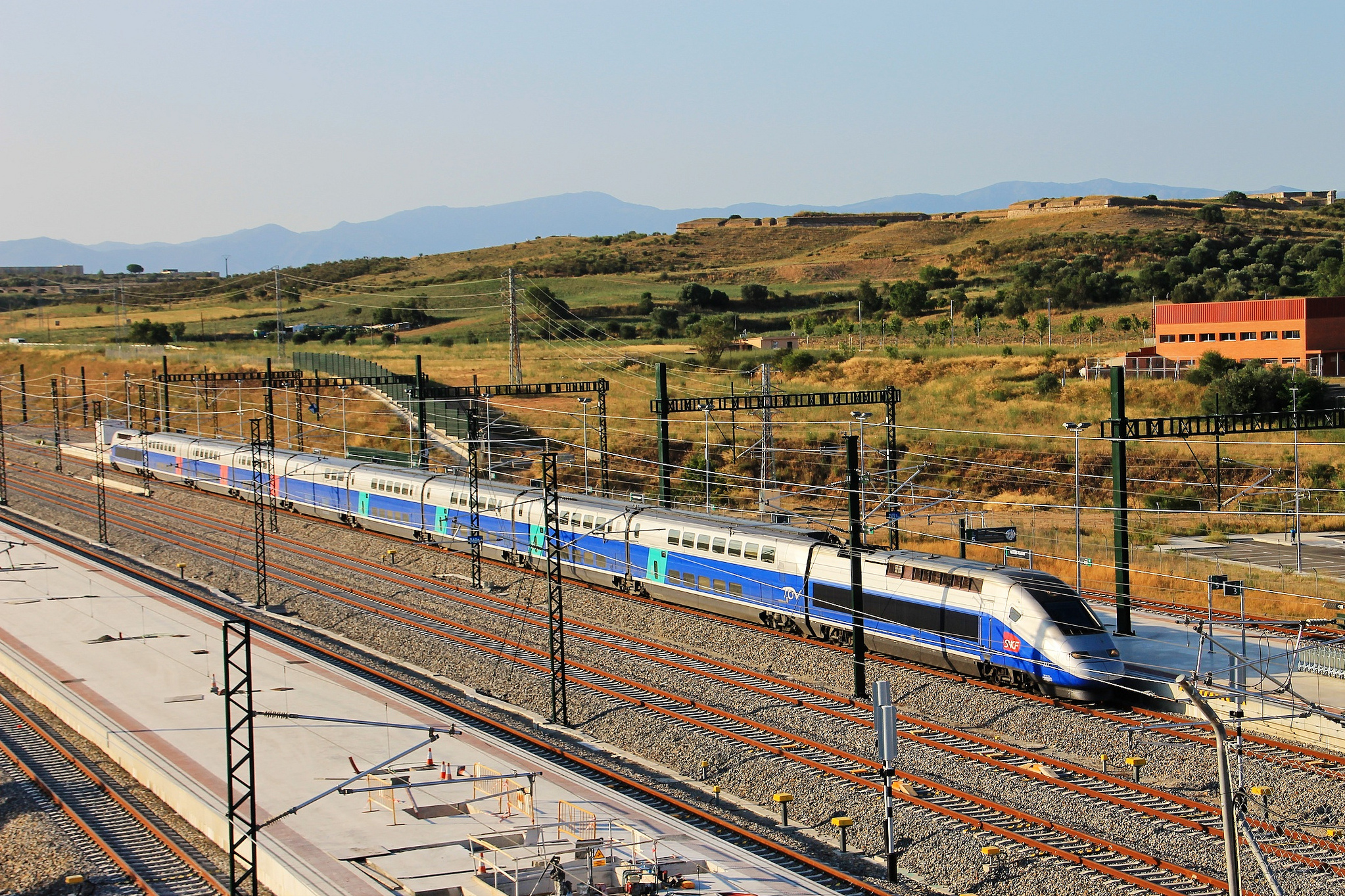 TGV llegando a la estación de Figueres - Vilafant. Detrás, en la colina de la derecha, el Castell de Sant Ferran.